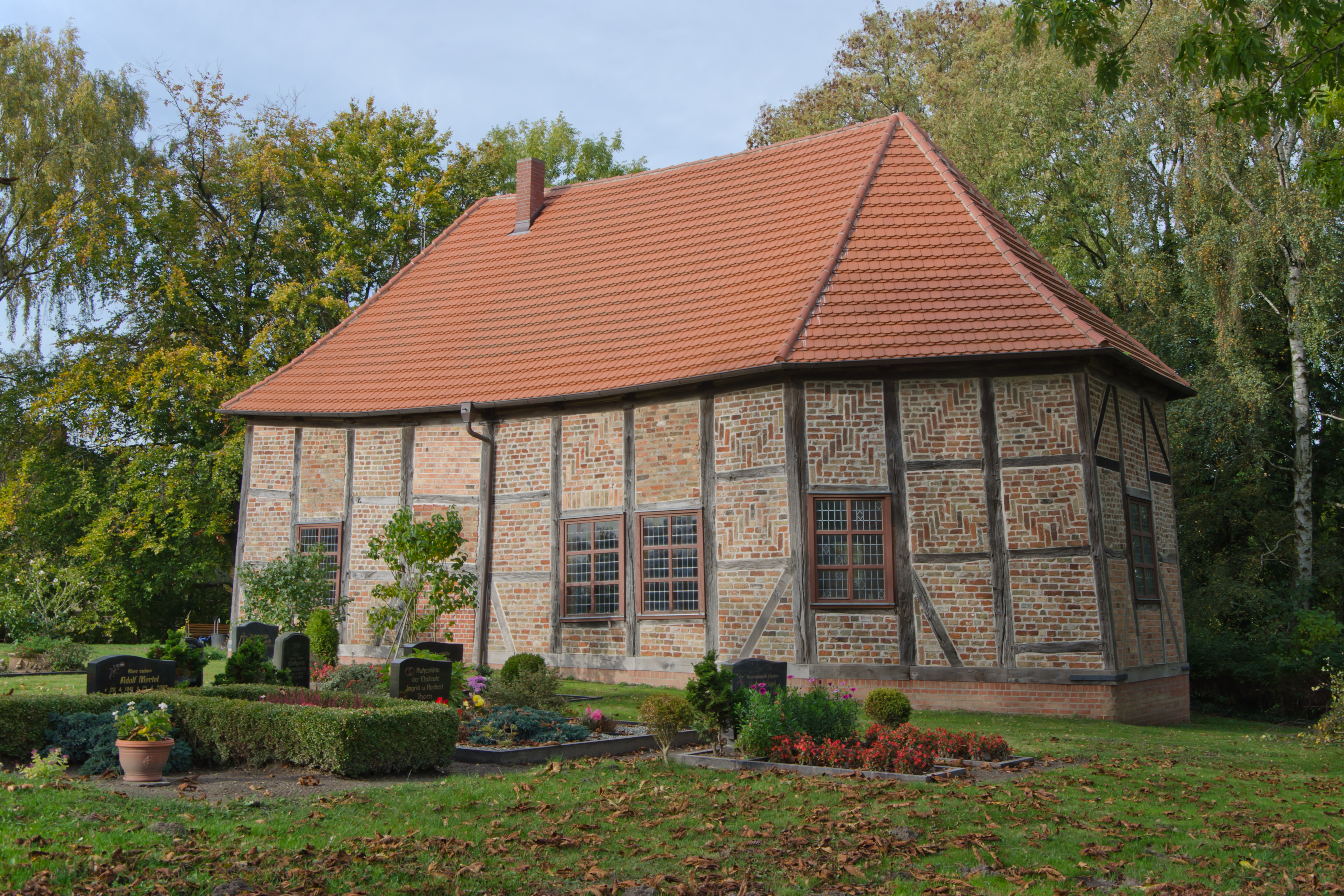 Langen Trechow, Kirche